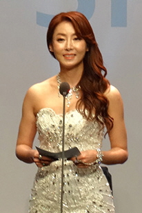 2013 대한민국 e-스포츠 대상 시상식 : 제1부